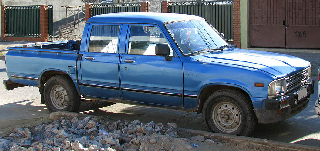 Toyota Hilux Crew Cab 1982